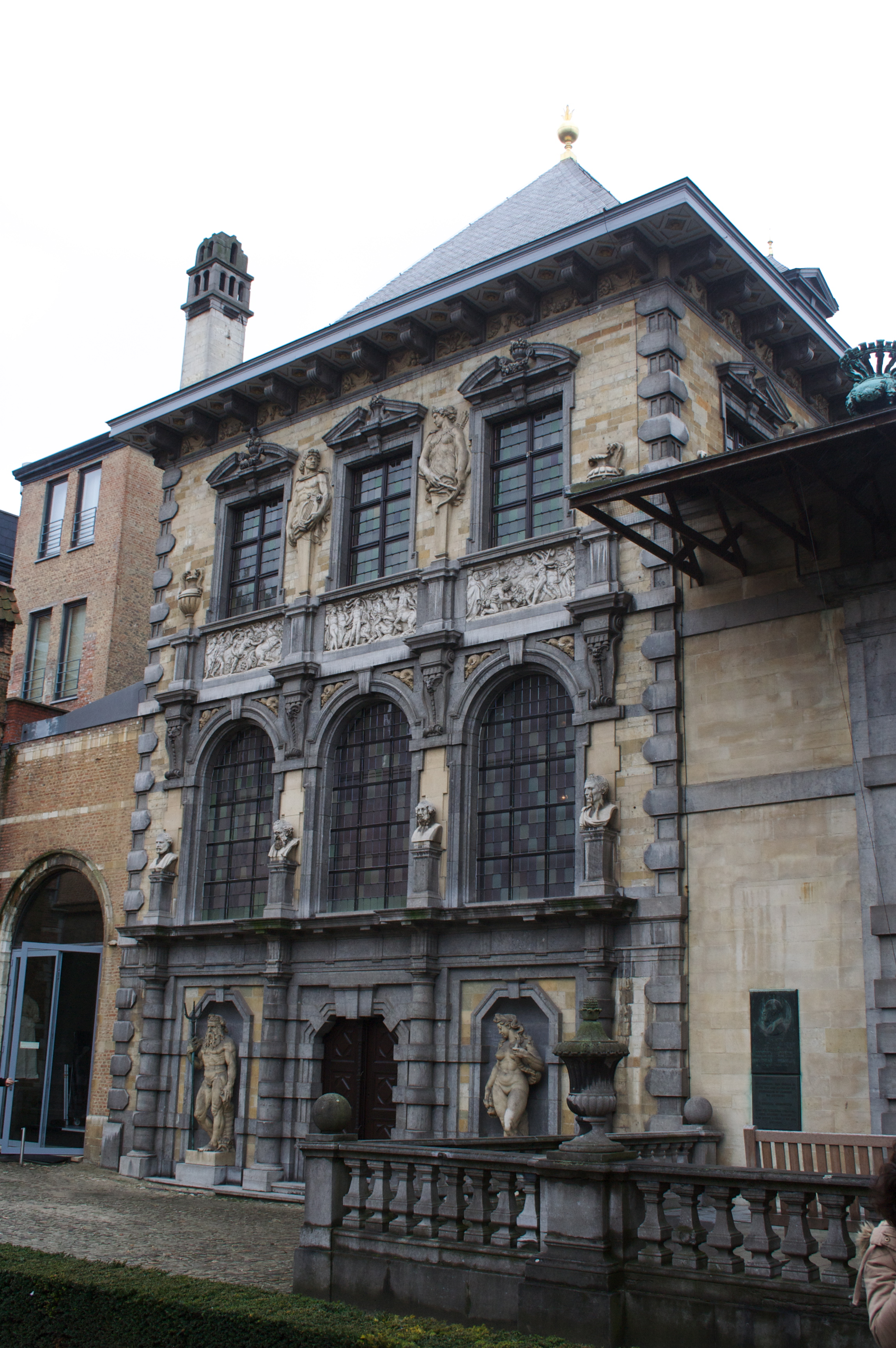 Casa-taller de Rubens en Amberes ( Antwerpen ).